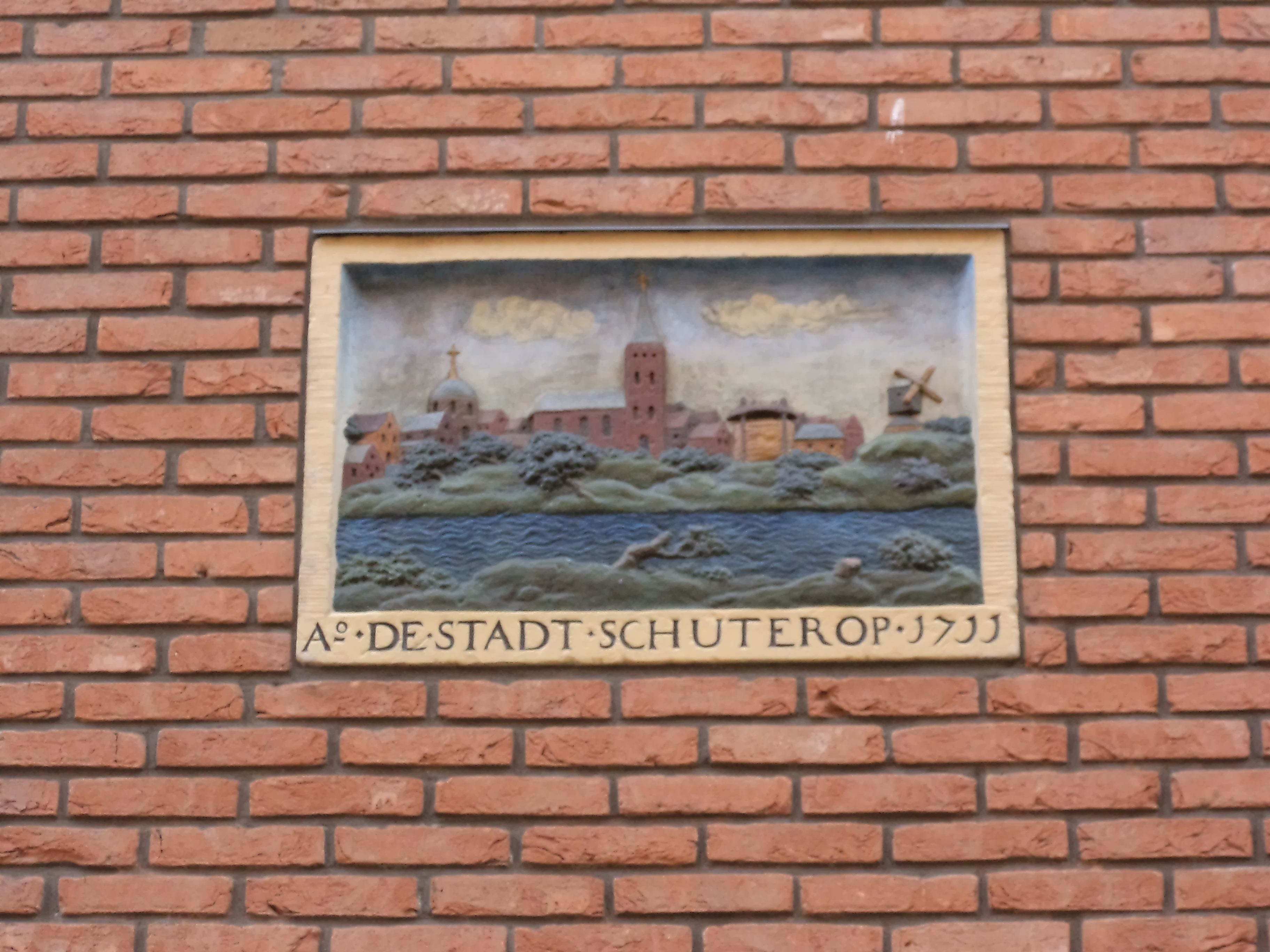 Op de gevelsteen Schutterop staat de Duitse stad Schüttorf afgebeeld met onderschrift OA DE STAD SCHUTEROP 1711. De steen was het kenmerk van een pand dat bij de invoering van de huisnummering werd aangemerkt als Keizersstraat 12. Omstreeks 1900 is het oorspronkelijke pand gesloopt en ging de gevelsteen ‘reizen’. Na vele omzwervingen via Arnhem, Kalmthout in België, Starnberg in Duitland en uiteindelijk Amsterdam Buitenveldert kwam de gevelsteen in het bezit van de Vereniging Vrienden van Amsterdamse Gevelstenen (VVAG). Samen met de VVAG koos Ymere voor het restaureren en herplaatsen van de gevelsteen in de gevel van de verrezen nieuwbouw aan de Keizersstraat.